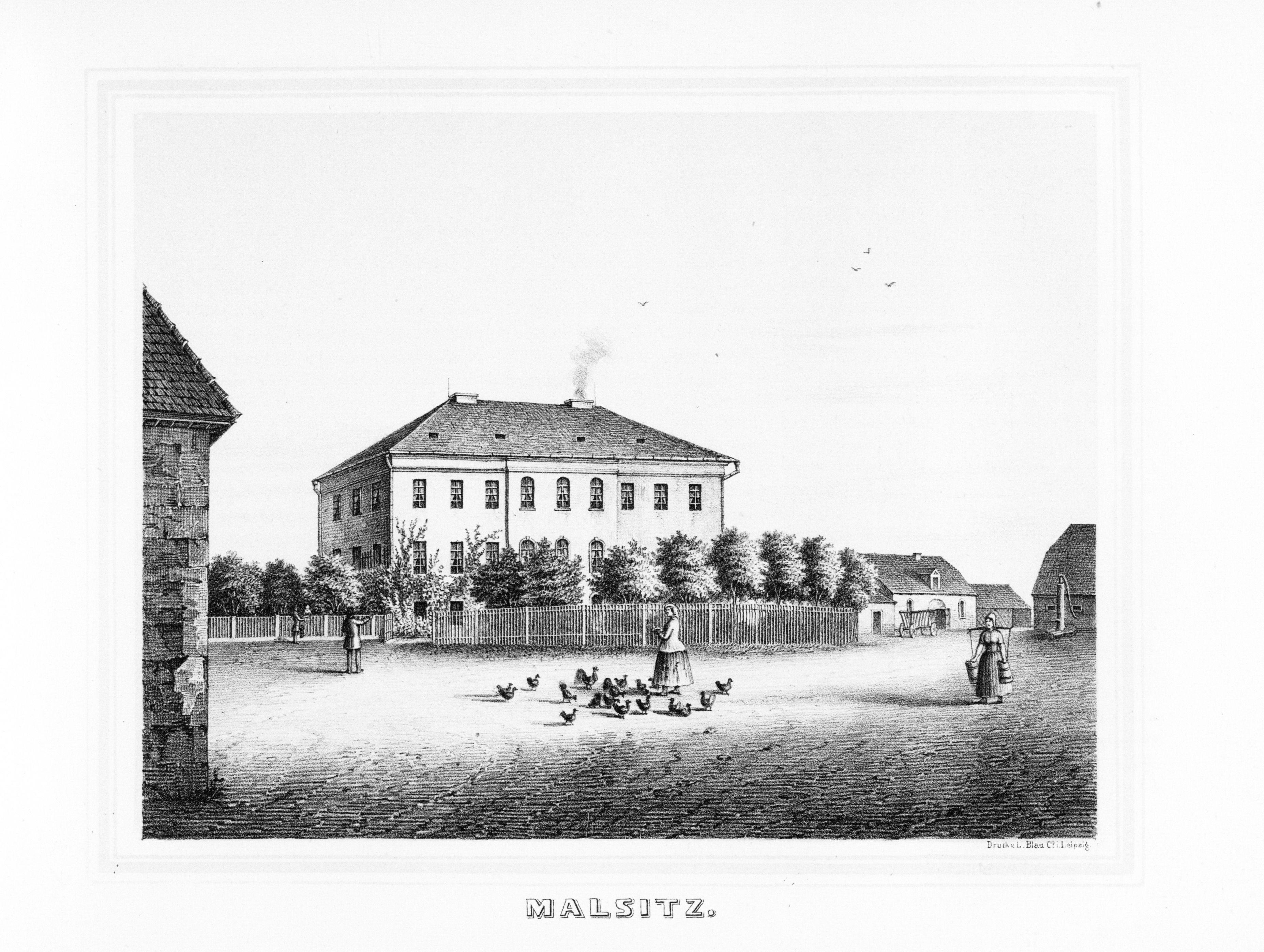 Malsitz aus: Album der Rittergüter und Schlösser im Königreiche Sachsen Markgrafenthum Oberlausitz Section: III